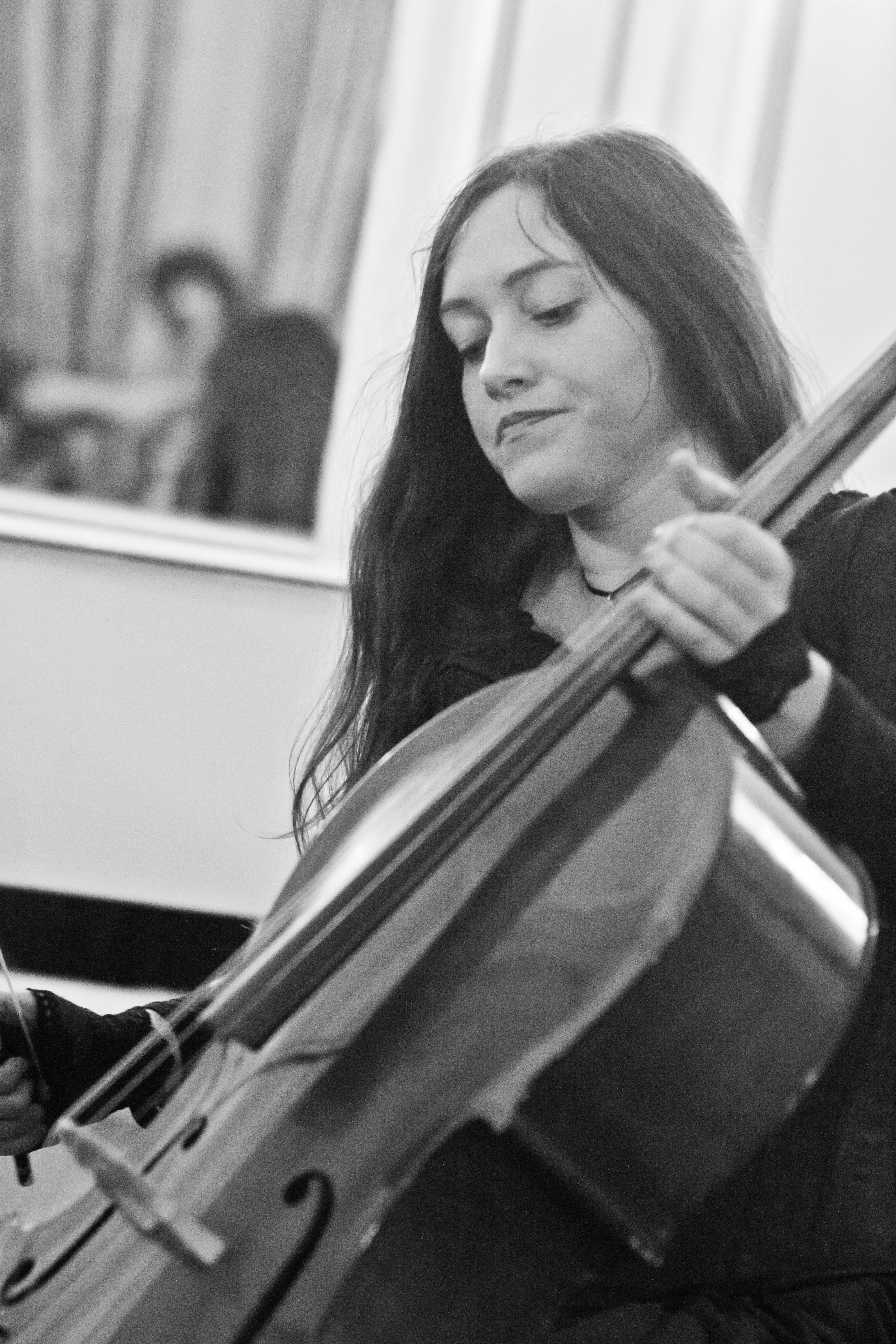 Музыкант и музыкотерапевт Алиса Апрелева в Библиотеке искусств имени А.П. Боголюбова (Москва) на презентации книги "Музыкант как волонтёр"